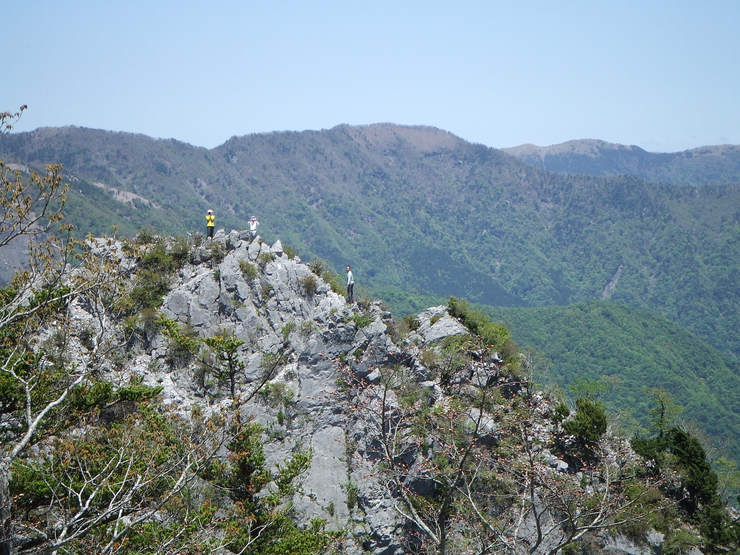 石立山の捨身嶽。後方は南南東から望む高ノ瀬。